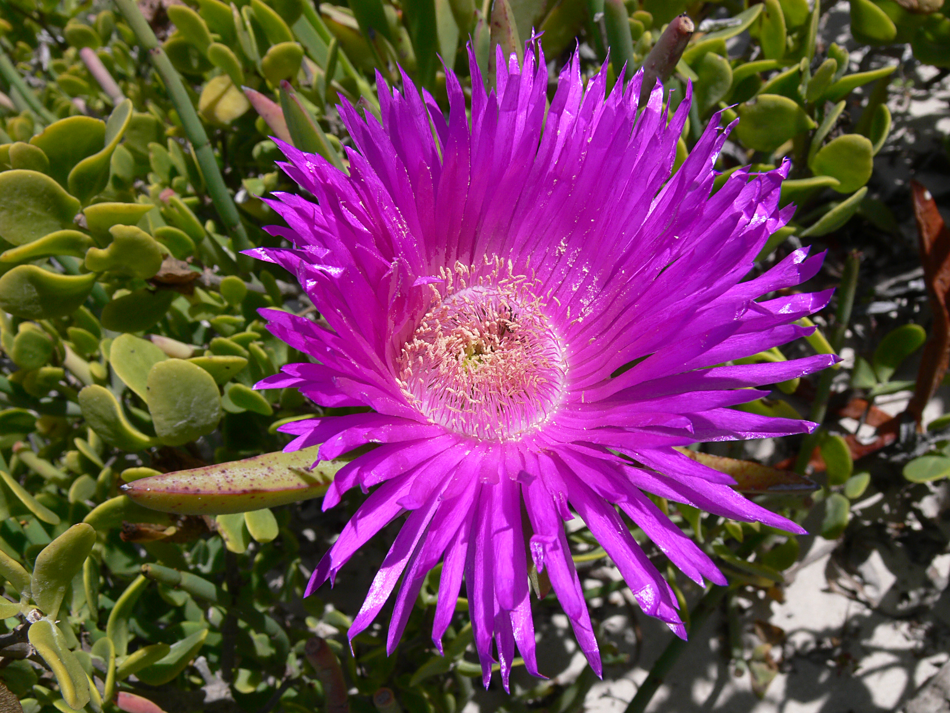 Rote Mittagsblume Carpobrotus acinaciformis (L.) L. Bolus, de Hoop National Park, Westkap, Südafrika